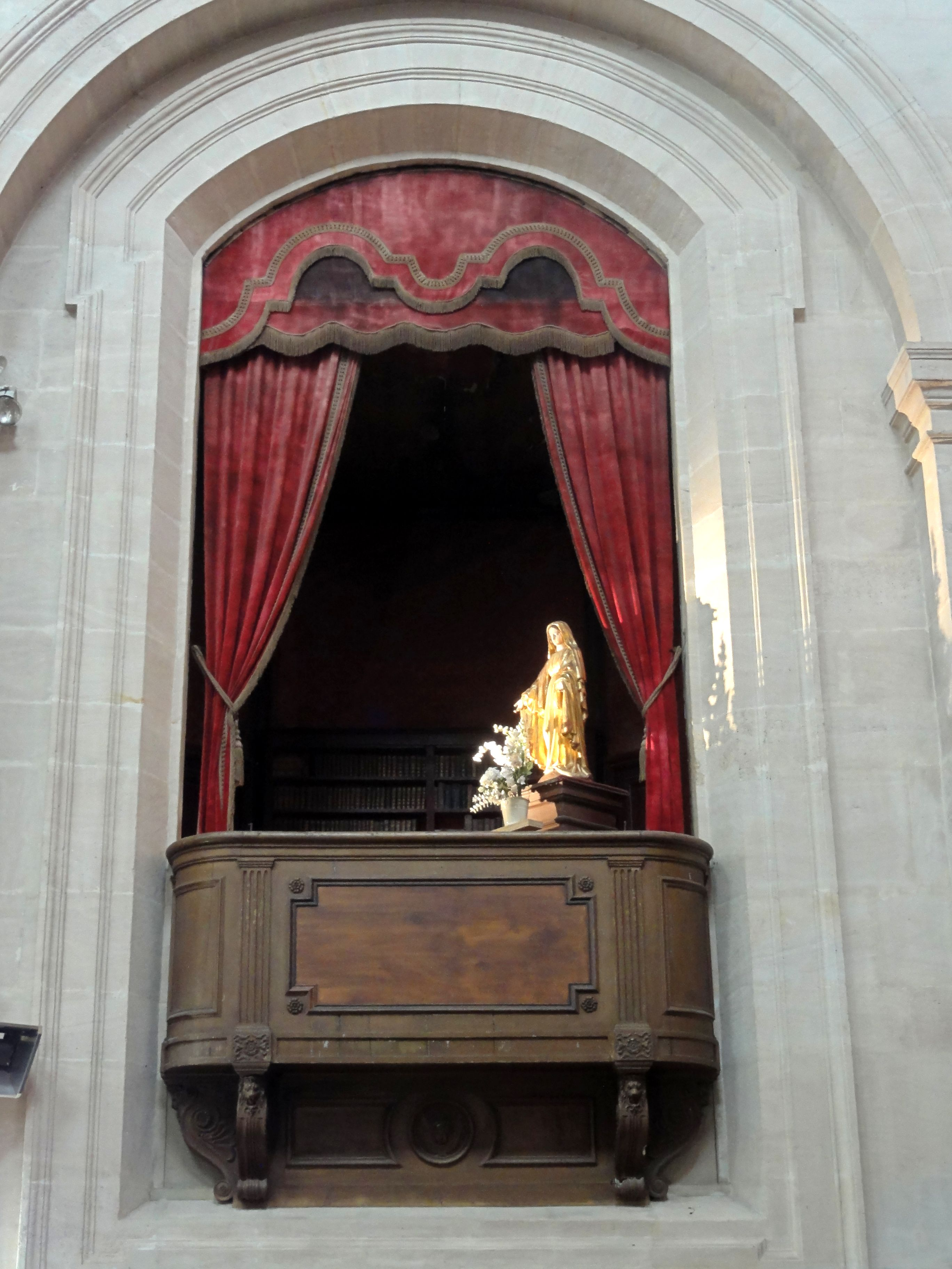 Chœur, tribune nord.